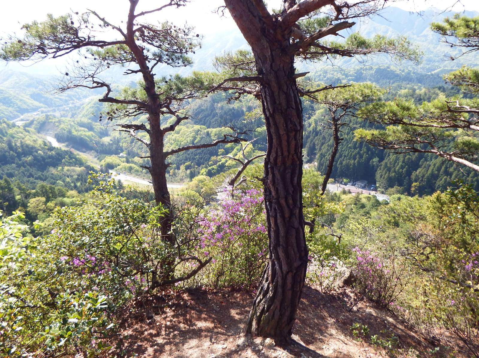 大窪寺の境内目前